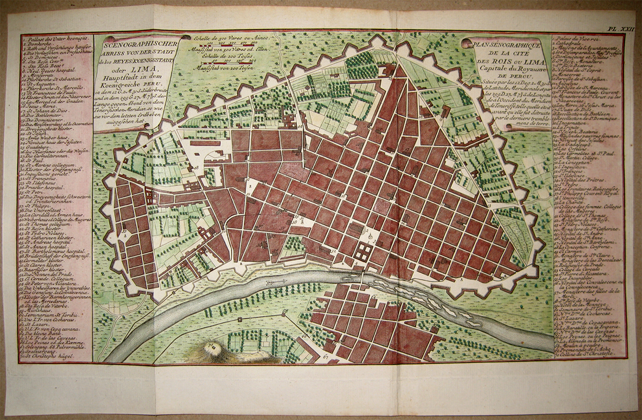 Plano de Lima en 1750 por Bellin